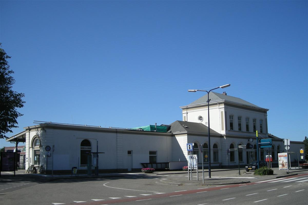 Station Harlingen, voorzijde